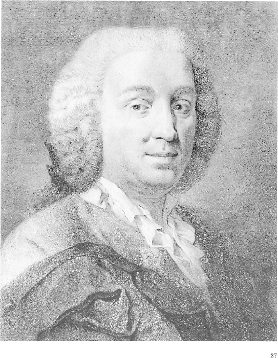 Marco Alvise Pitteri da Giovanni Battista Piazzetta, Ritratto di Goldoni con parrucca, incisione, 1754